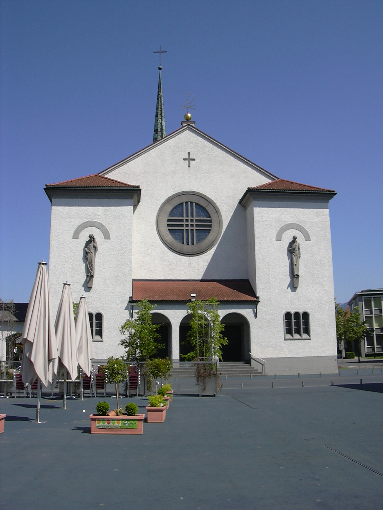 Pfarrkirche St. Peter und Paul in Lustenau